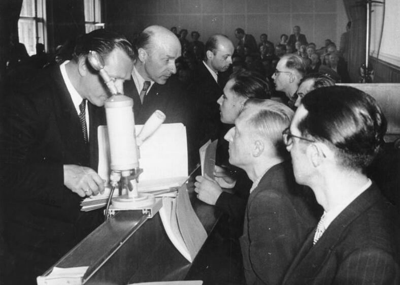 Zentralbild/Junge 21.6.1955 Prozeß gegen fünf Agenten der sogenannten KgU Vor dem 1. Strafsenat des Obersten Gerichts der Deutschen Demokratischen Republik begann am 21.6.1955 ein Prozeß gegen fünf Agenten der berüchtigten westberliner Diversanten und Spionagezentrale "Kampfgruppe gegen Unmenschlichkeit". Es sind angeklagt: Gerhard Benkowitz, Hans-Dietrich Kogel, Willibald Schuster, Gerhard Kammacher und Christian Busch. UBz: Die Verteidiger im Gespräch mit den Angeklagten (v.r.n.l.) Gerhard Benkowitz,Hans-Dietrich Kogel und Willibald Schuster.